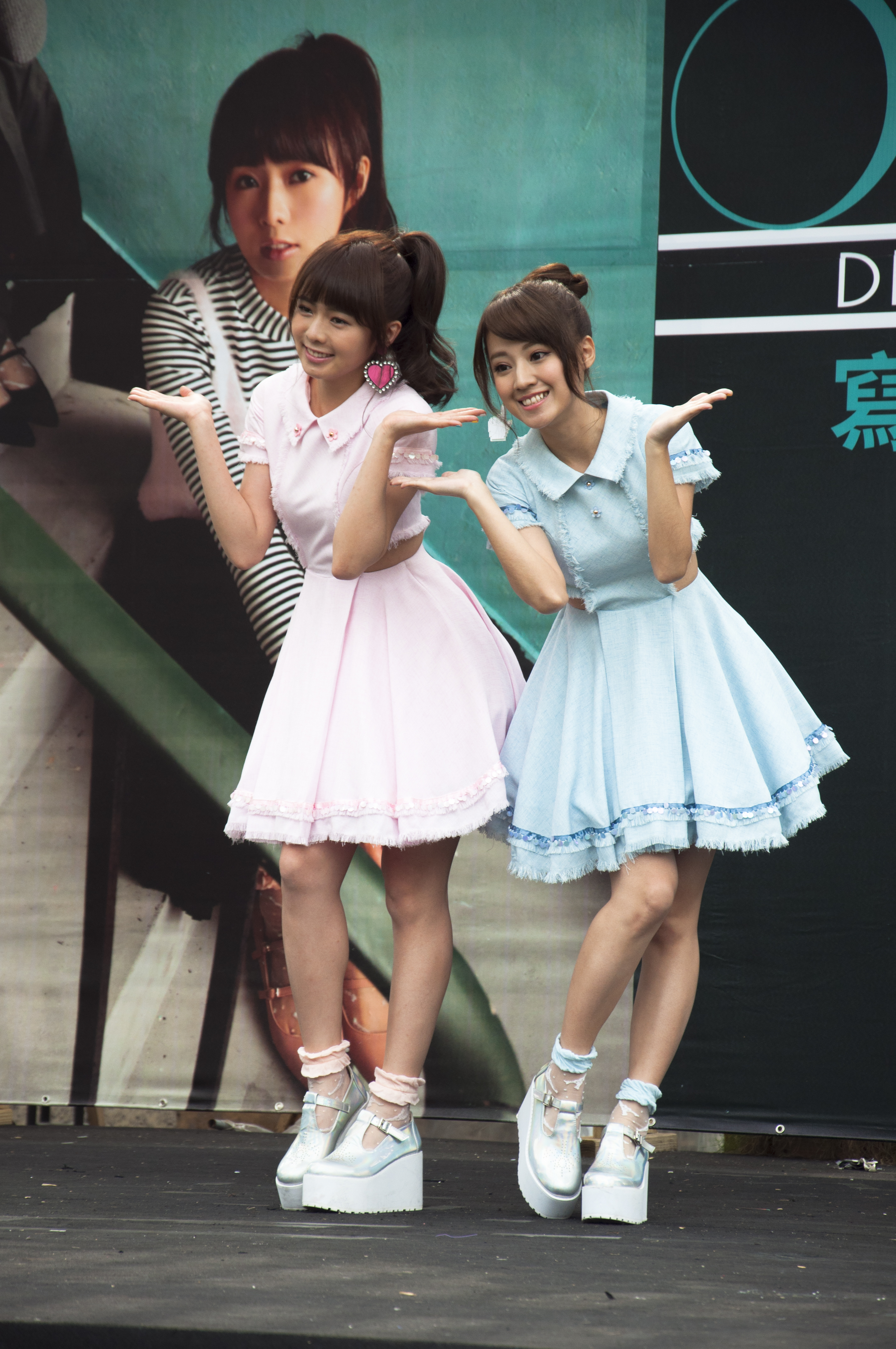 寫真EP《Say Yes》台北預購簽唱會